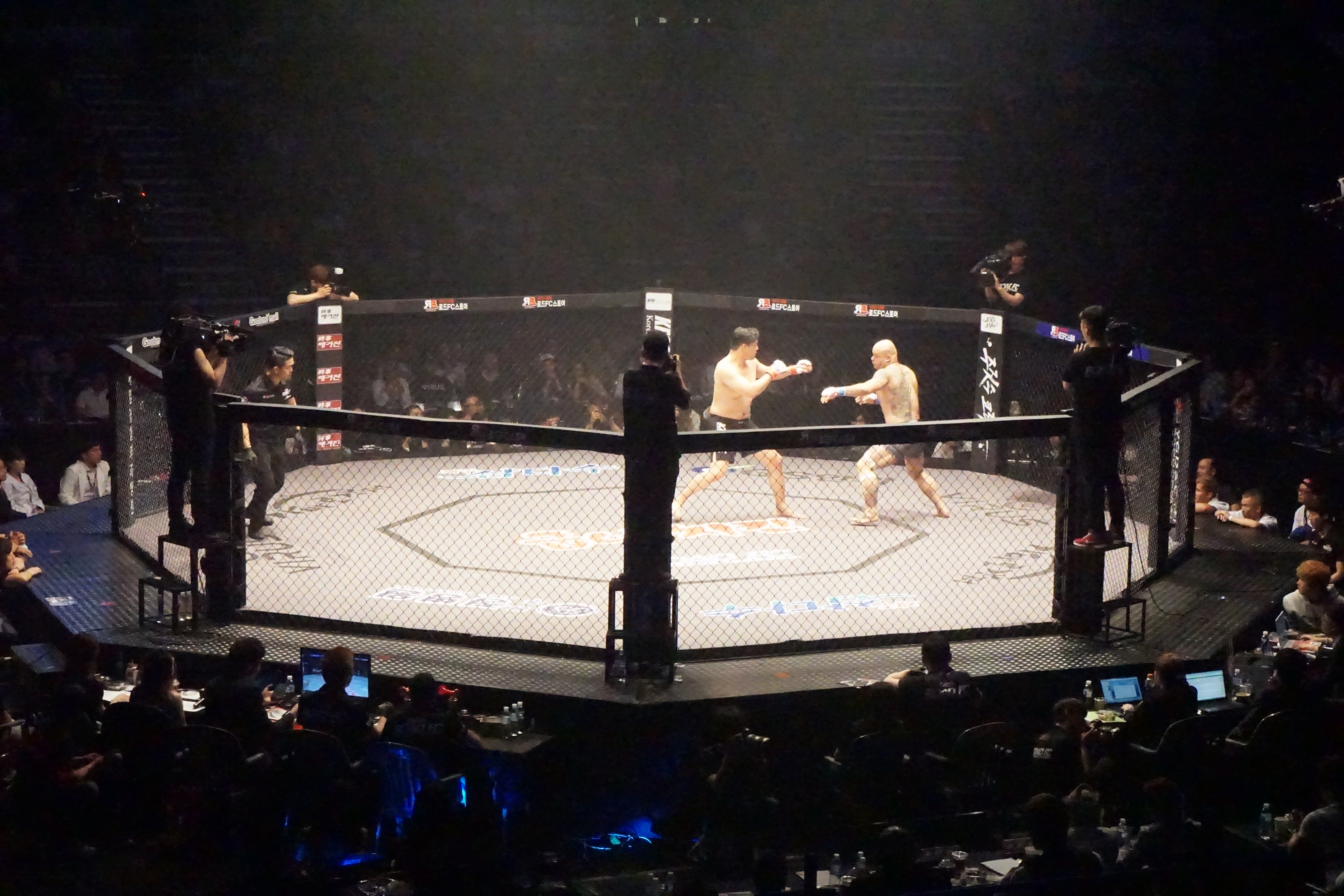 로드 FC 023 대회가 진행되는 장충체육관